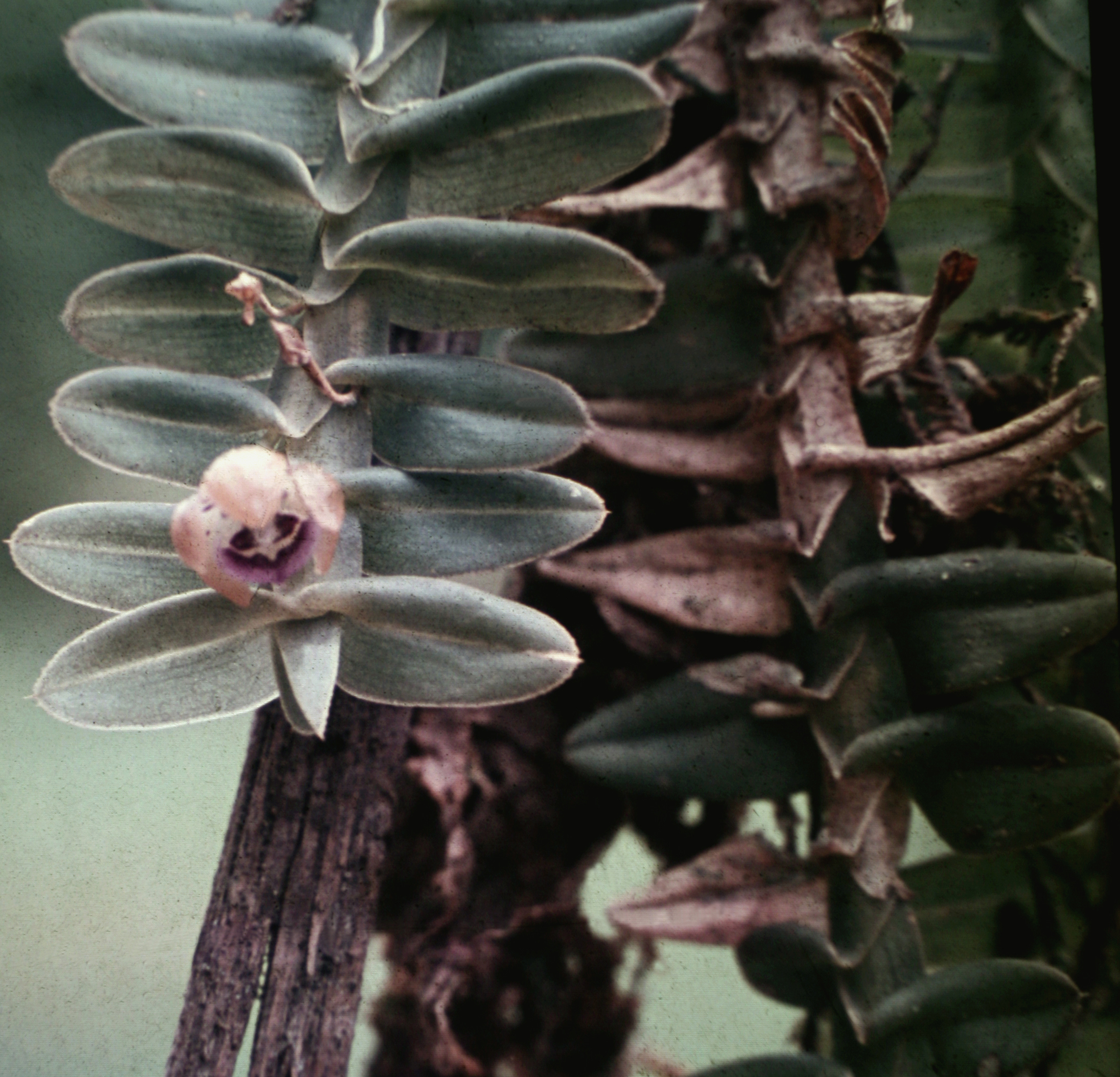 Dichaea muricata. Suriname.